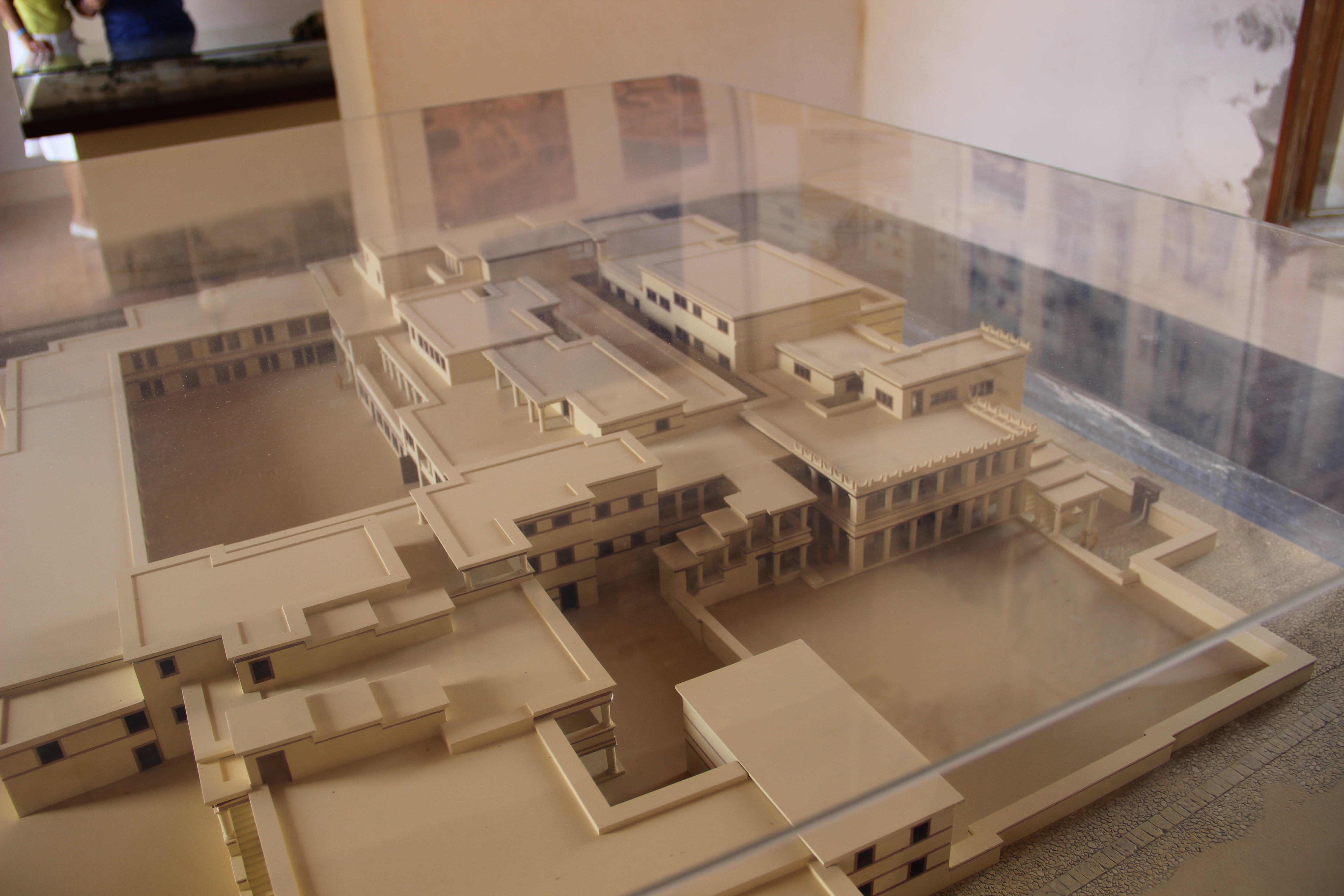 Макет дворца. Минойский дворец. Malia. Lasithi. Crete. Greece. Июль 2013